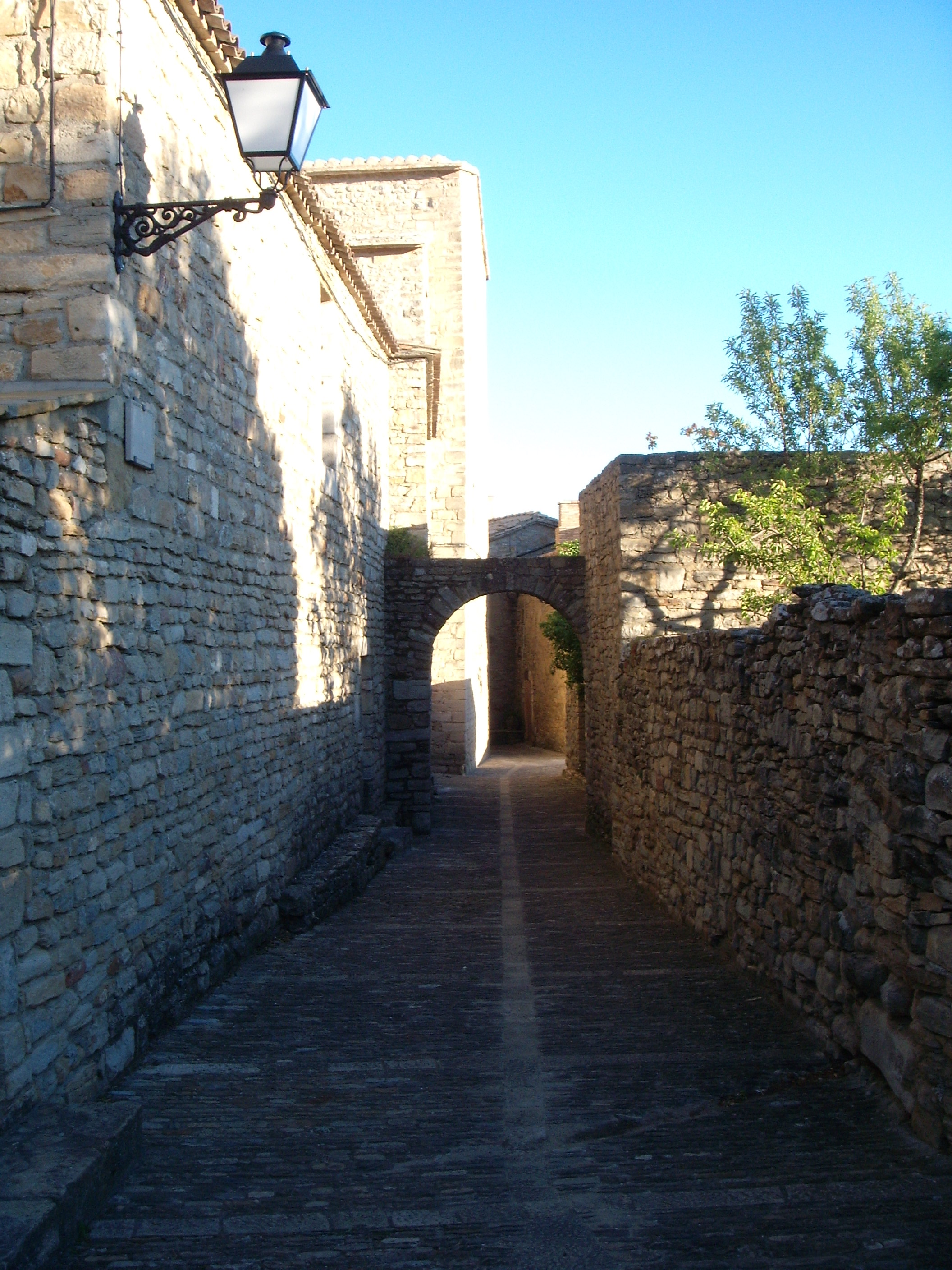 Una calle de Roda de Isábena